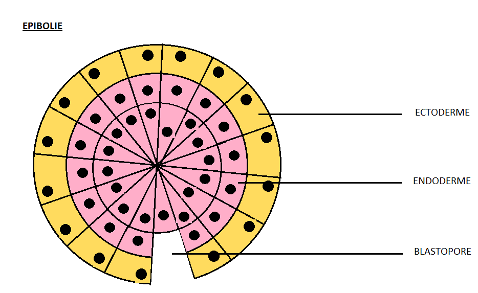 ceci est le schéma d'un type de gastrulation.